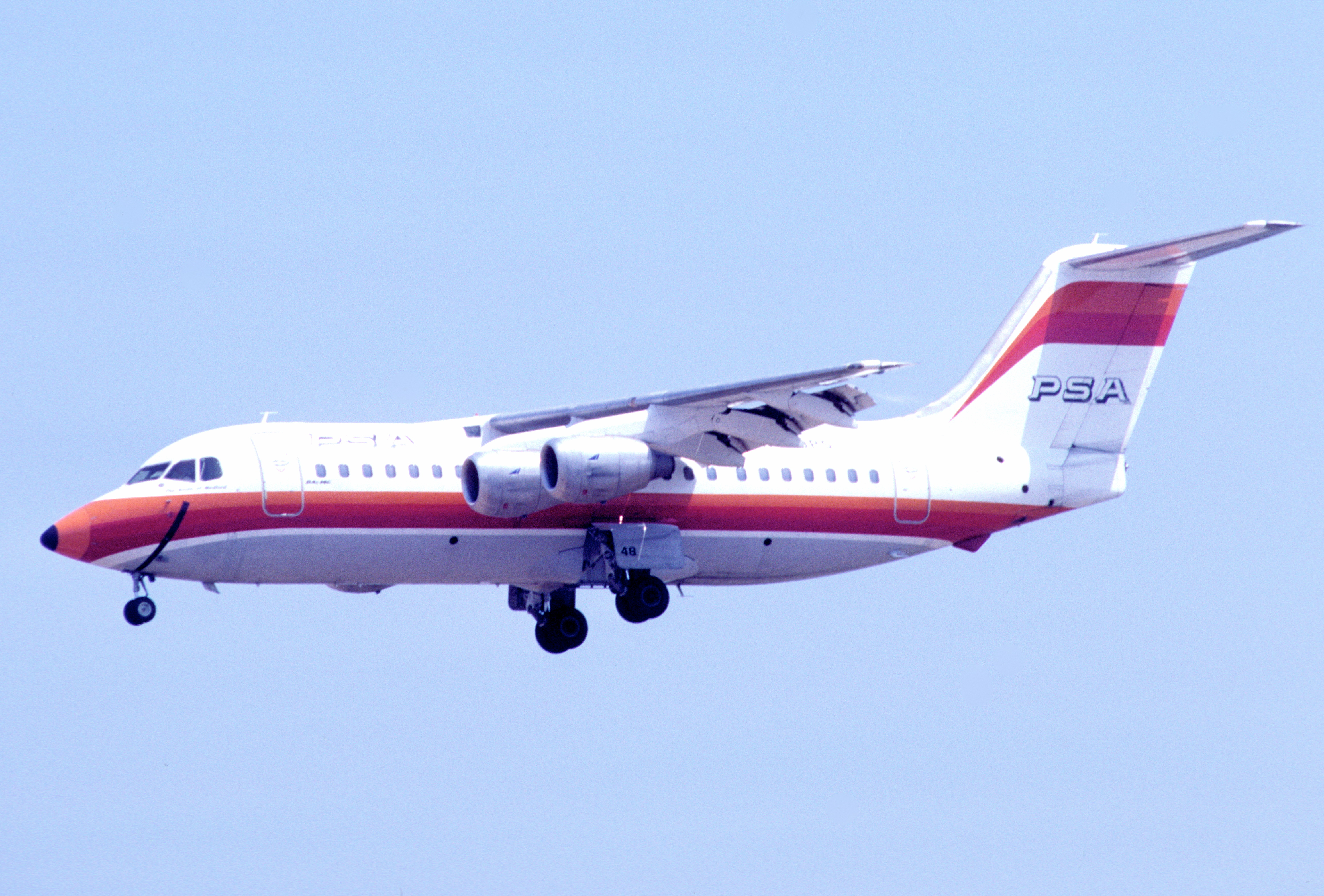 PSA BAe 146-200A; N348PS, May 1987/BEW